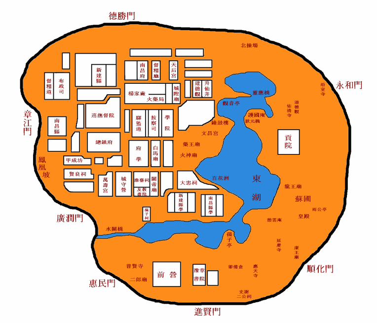 贛語: 南昌老城地圖